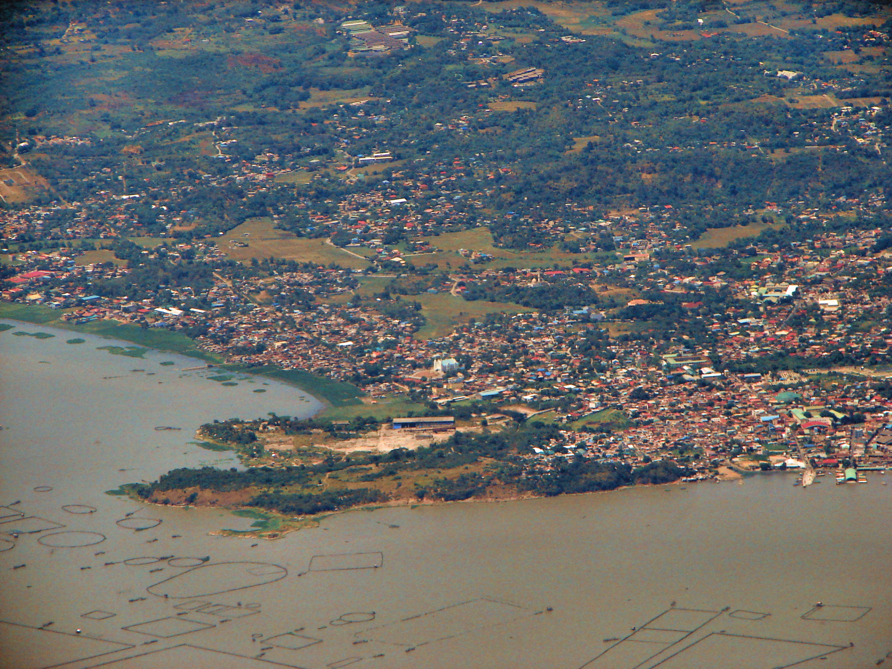 Binangonan, Rizal, Philippines